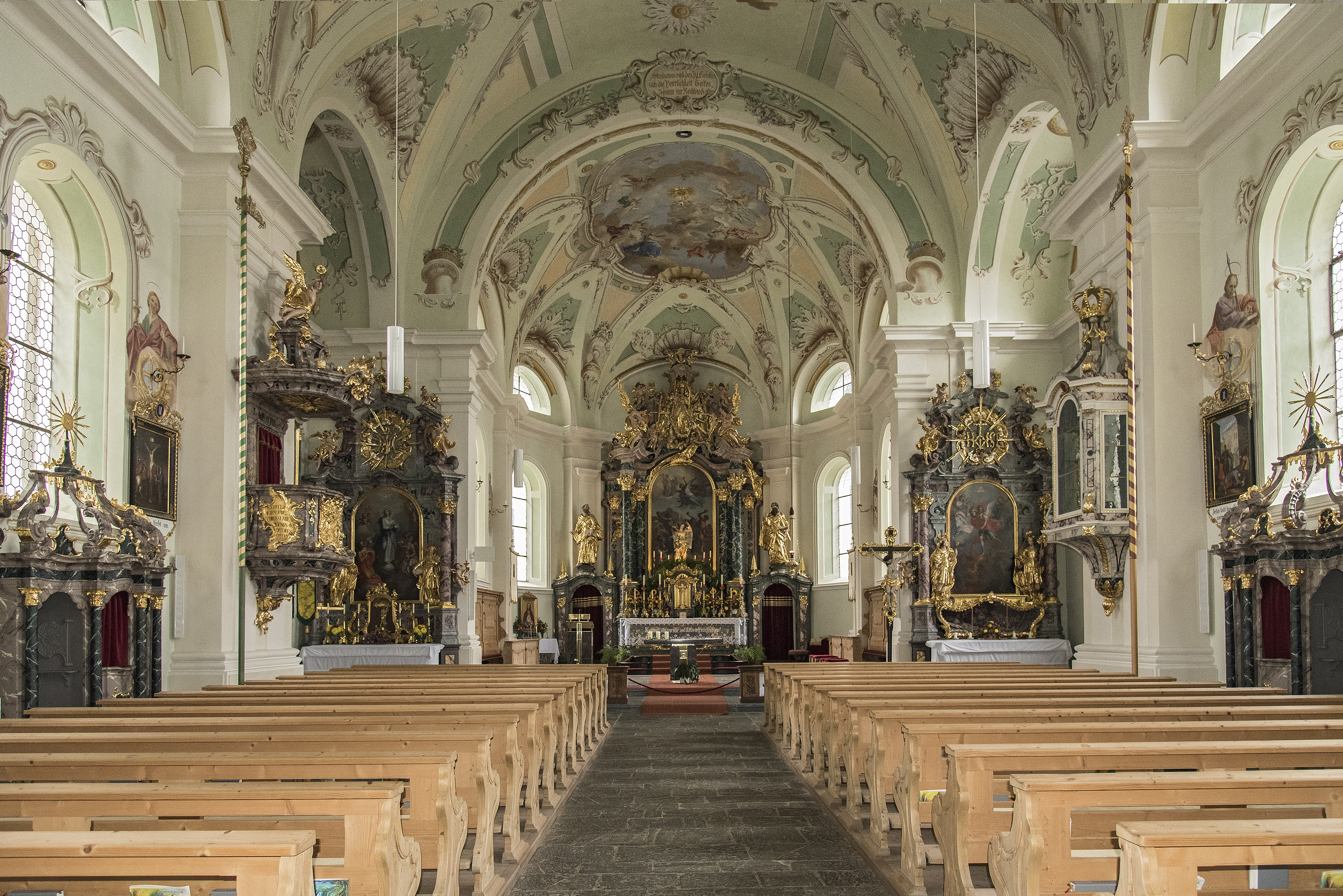 Kath. Pfarrkirche St. Stephan. Das Kircheninnere mit den Fresken von Martin Knoller.